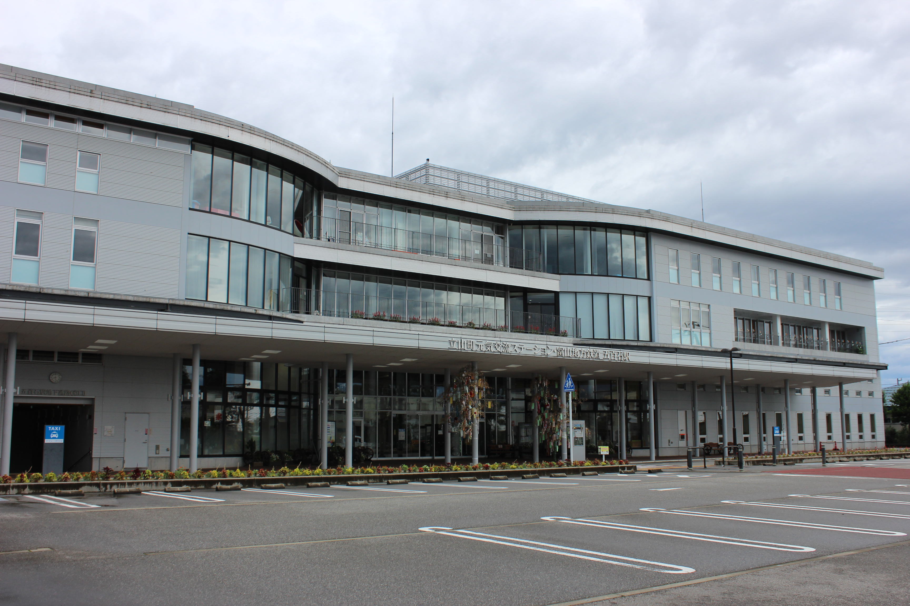 富山地方鉄道立山線五百石駅